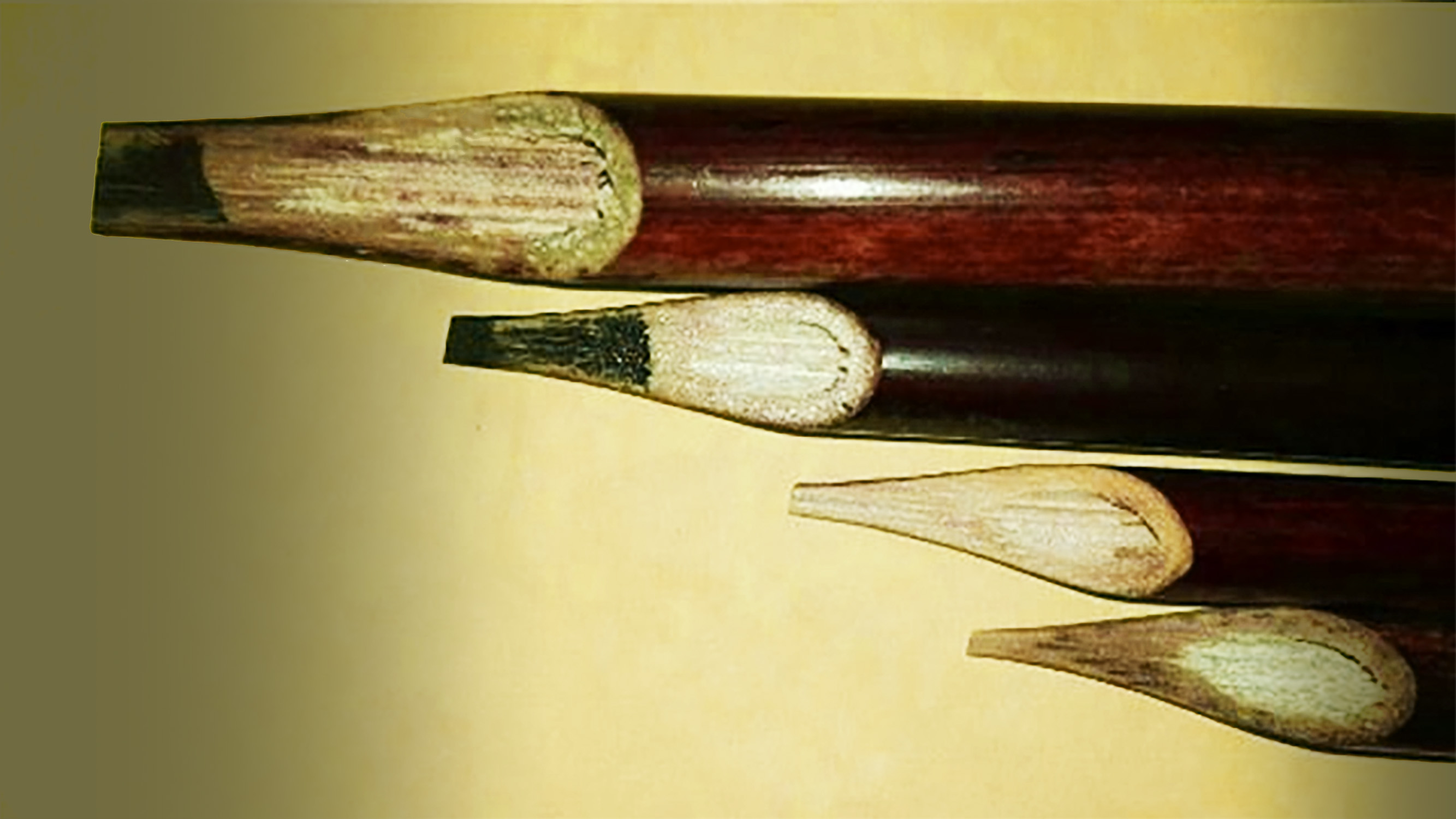 Reed Pens